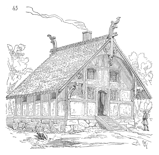 ... En Norvége et en Islande, il existe encore quelques-unes de ces bâtisses en charpente d'une époque assez récente (XVIe siècle), mais qui reproduisent exactement les formes et les procédés d'un art beaucoup plus ancien. Dans ces habitations, comme sur les broderies de la tapisserie de Bayeux, on remarque, par exemple, ces poinçons richement décorés qui terminent les deux extrémités du faîtage et qui sont reliés au-dessus du comble par une pièce de bois découpée en manière de crête. On voyait encore dans les campagnes de l'Eure, il n'y a pas longtemps, des restes affaiblis de cette tradition exprimés clairement dans notre figure 43. Ces maisons normandes des XIe et XIIe siècles ne contenaient qu'une salle assez élevée, éclairée de tous côtés, couverte par une charpente grossièrement lambrissée. Le foyer était placé vers le milieu de la pièce, et la fumée s'échappait par un tuyau de bois passant à travers la couverture en bardeaux épais ...